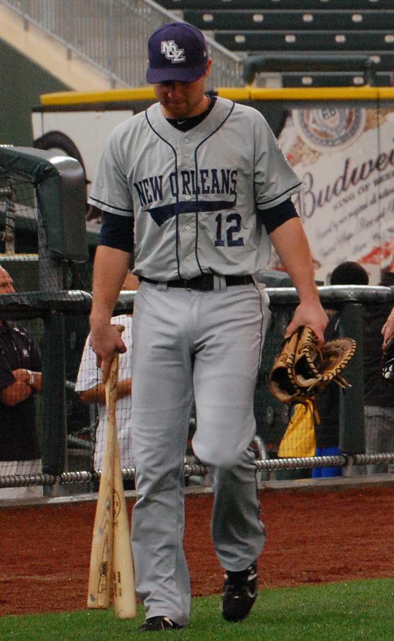 Donnie Murphy